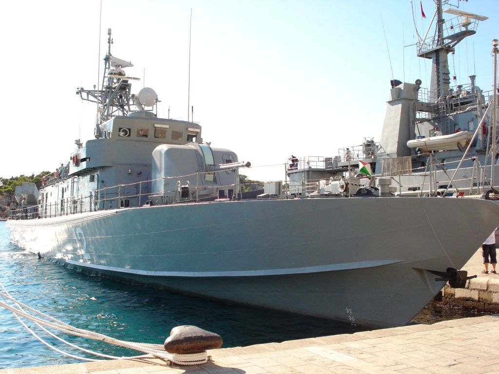 RTOP-12 Kralj Dmitar Zvonimir